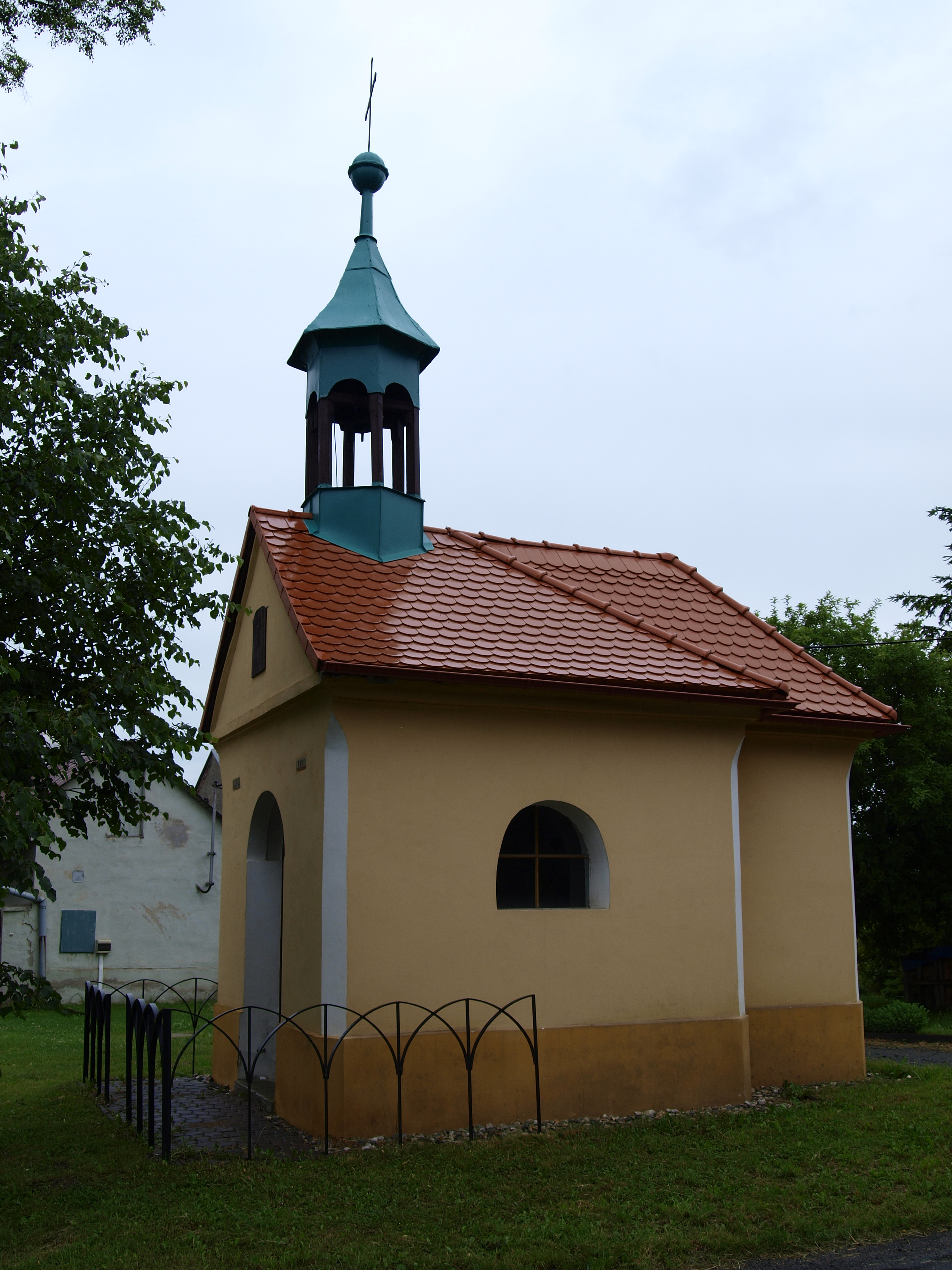 Krnov (Liboš), Kaple sv. Antonína Paduánského od východu This file was uploaded during the project of WikiTown Litovel.